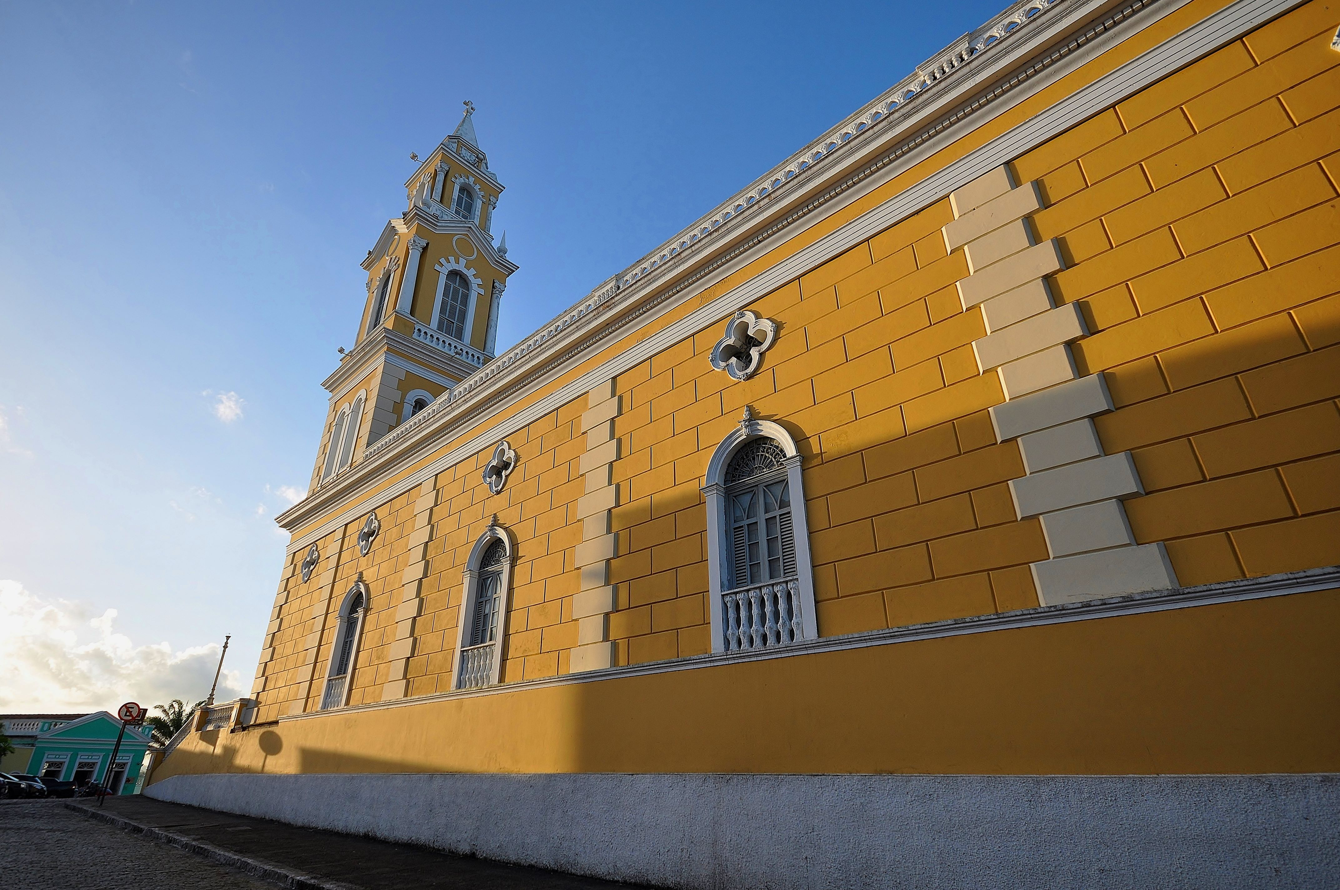 Centro Histórico de João Pessoa Largo de São Frei Pedro Gonçalves